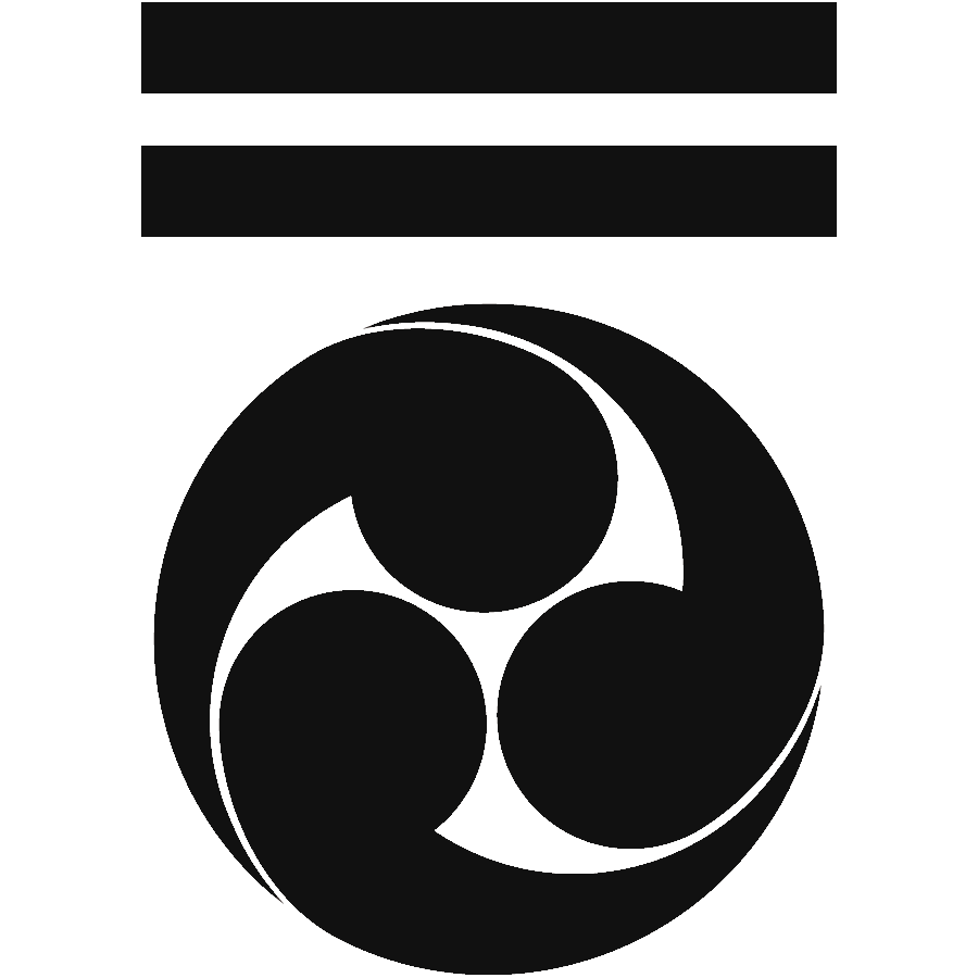 二引両に左三つ巴